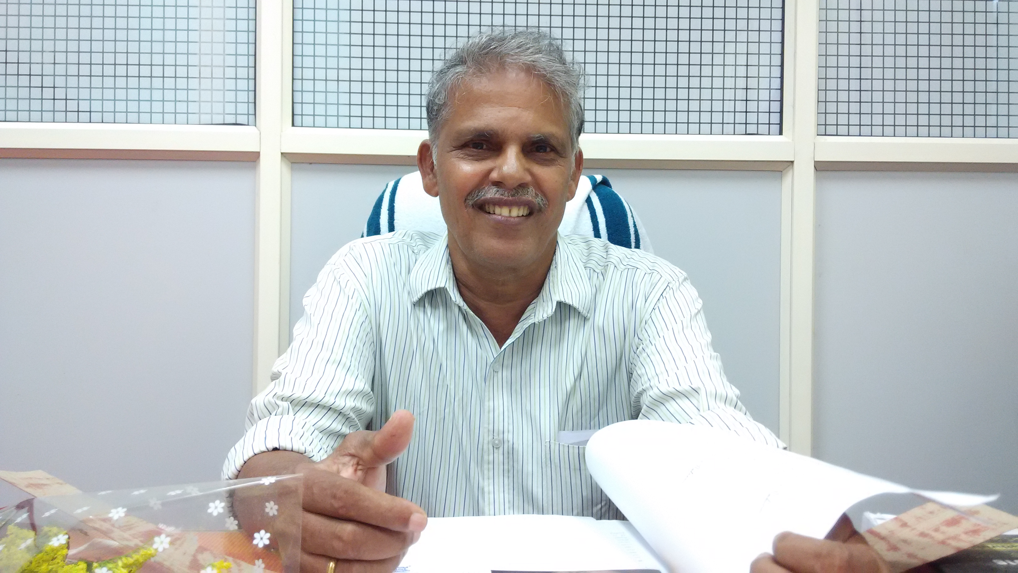 ഗണിതശാസ്ത്രസാഹിത്യകാരനും ബാലസാഹിത്യകാരനുമായ പള്ളിയറ ശ്രീധരന്‍ ബാലസാഹിത്യ ഇന്‍സ്റ്റിറ്റ്യൂട്ടില്‍.